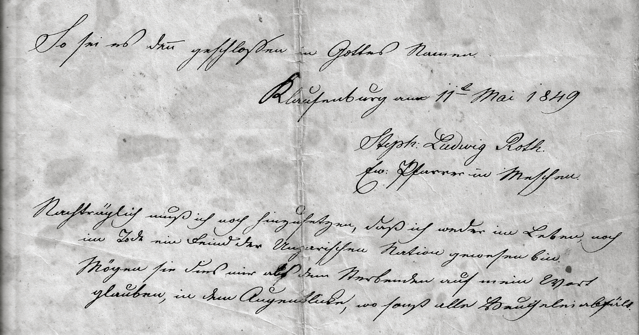 Ausschnitt aus einer alten Abschrift von Stepahn Ludwig Roths Abschiedsbrief an seine Kinder